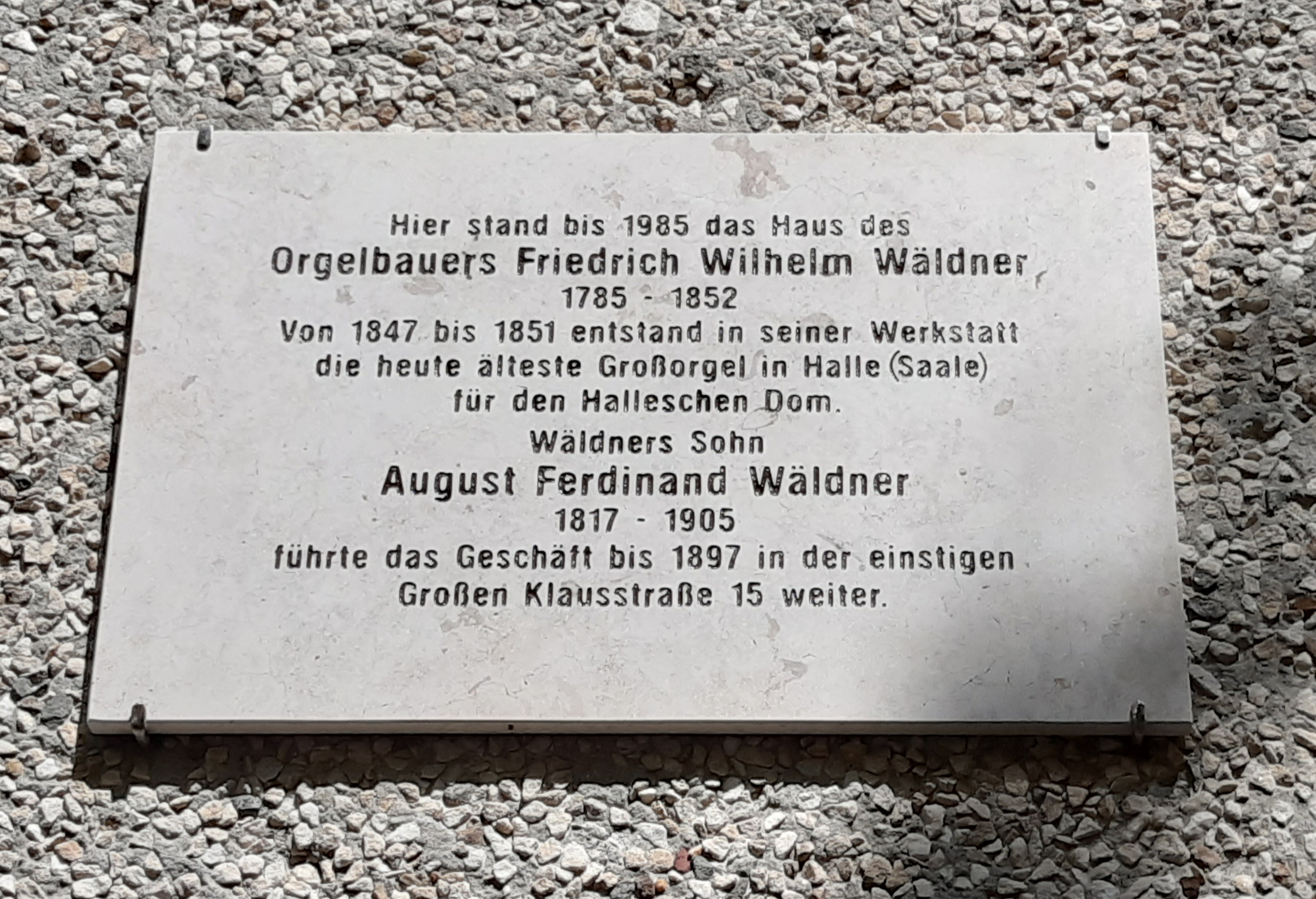 Erinnerungstafel am Haus Salzstraße 4 in Halle (Saale), einem Neubau, für Friedrich Wilhelm Wädner und seinen Sohn August Ferdinand Wäldner, Orgelbauer aus Halle